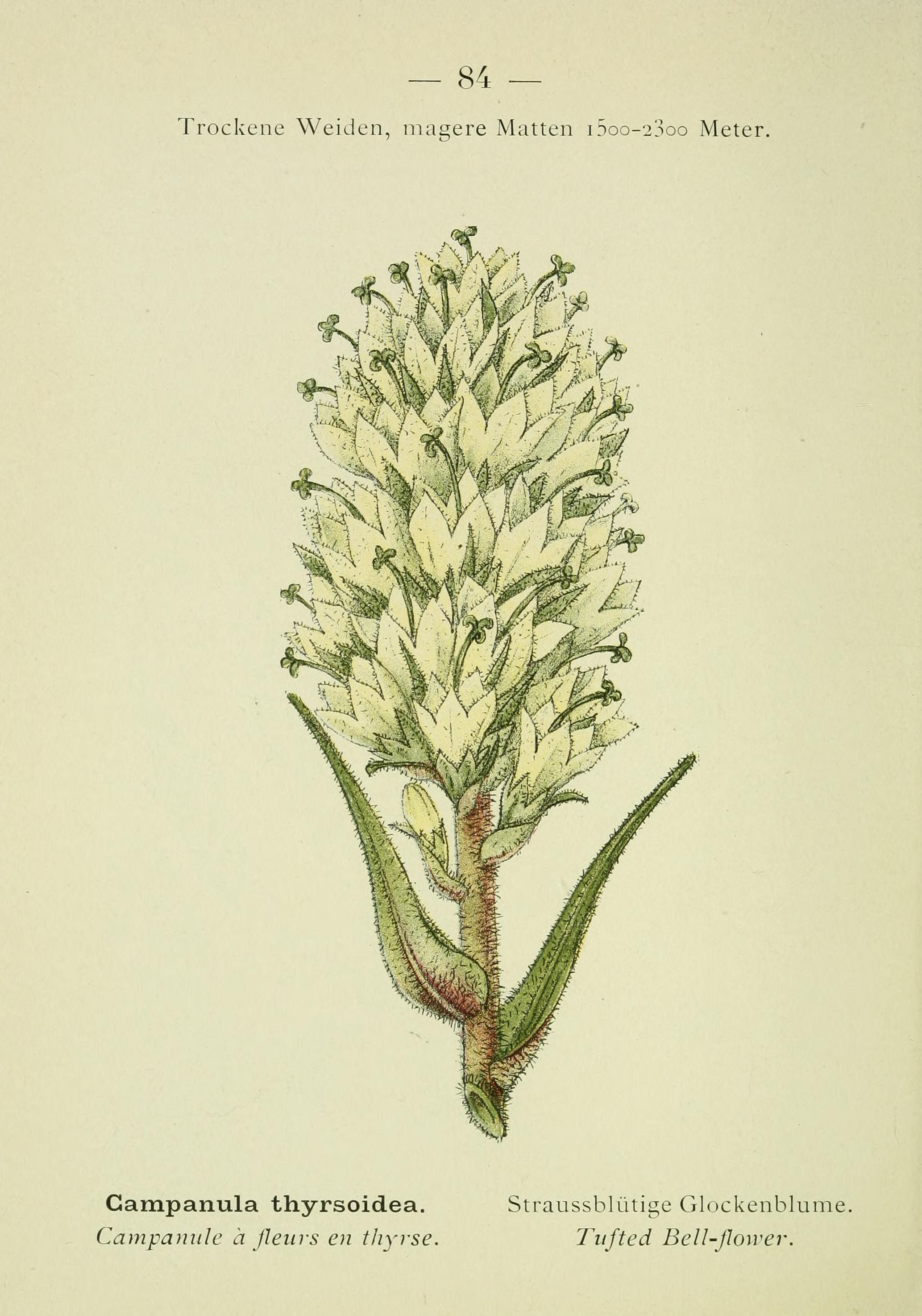 Alpen-Flora : Westalpen / von G. Senn ; mit 144 farbigen Tafeln nach am Standorte gemalten Aquarellen von C. Kaftner.